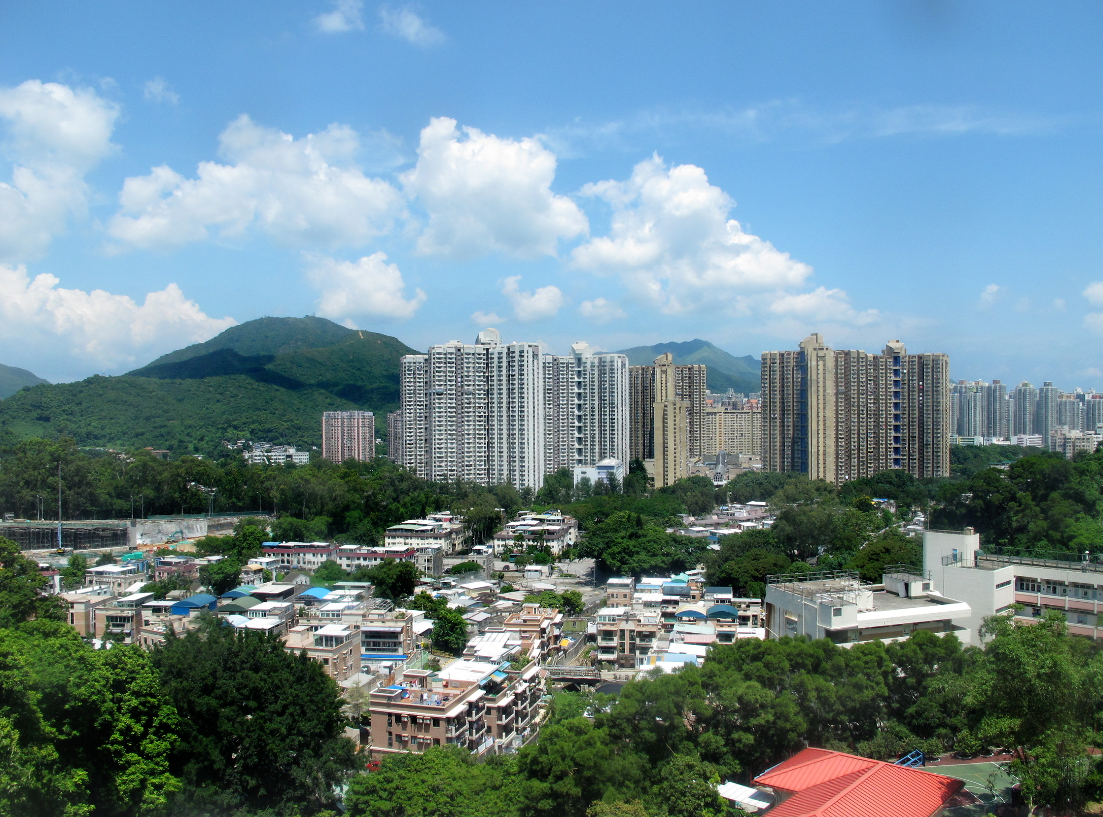 Tai Wo Skyline